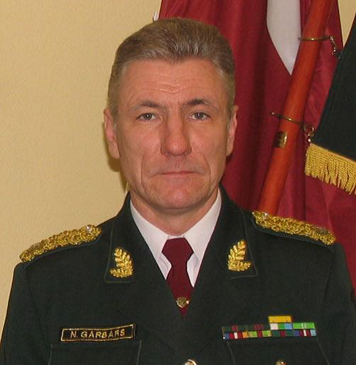 руководитель Государственной пограничной охраны